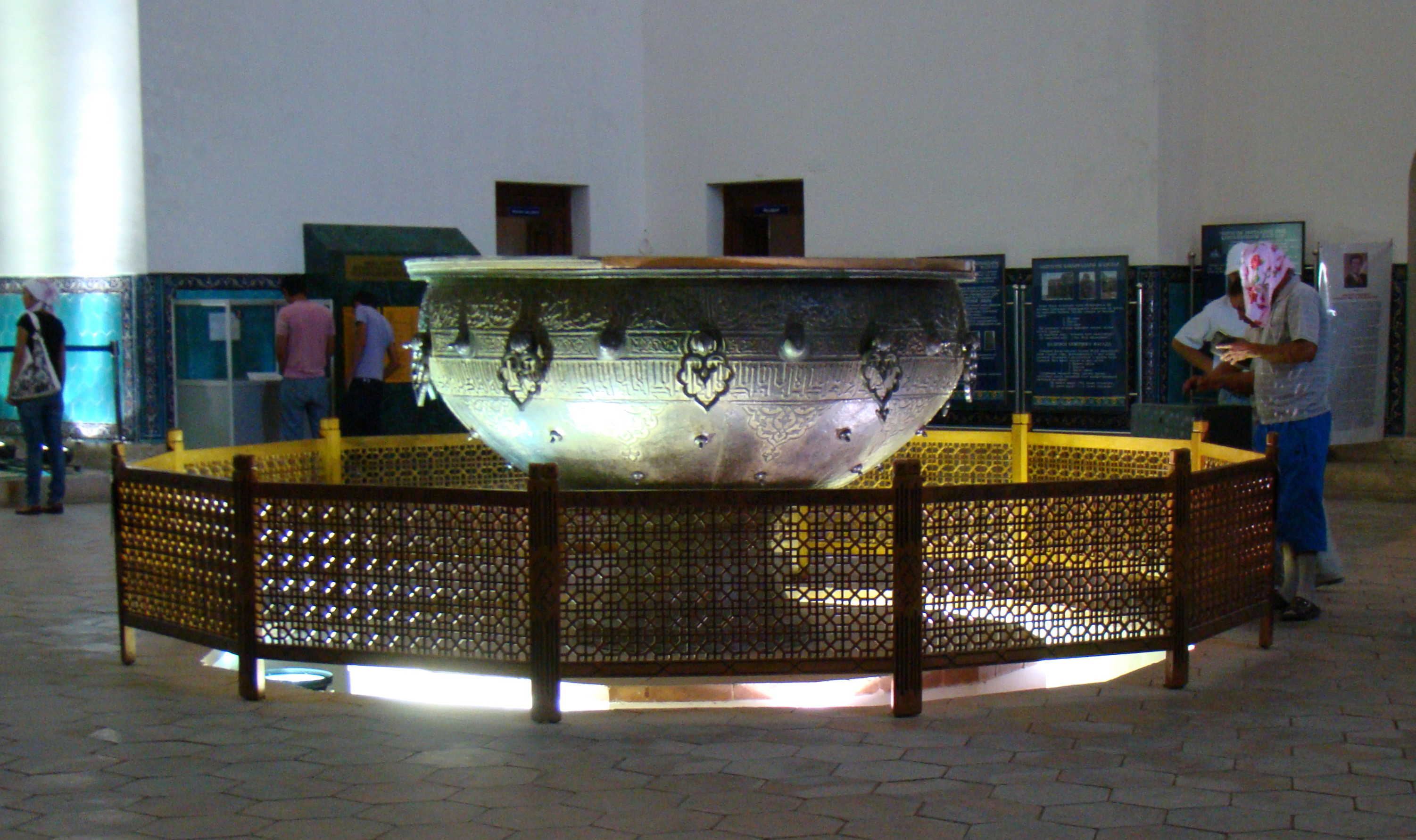 Комплекс Ахмеда Ясави в городе Туркестан, Южно-Казахстанская область. Ритуальный казан - почитаемая реликвия.